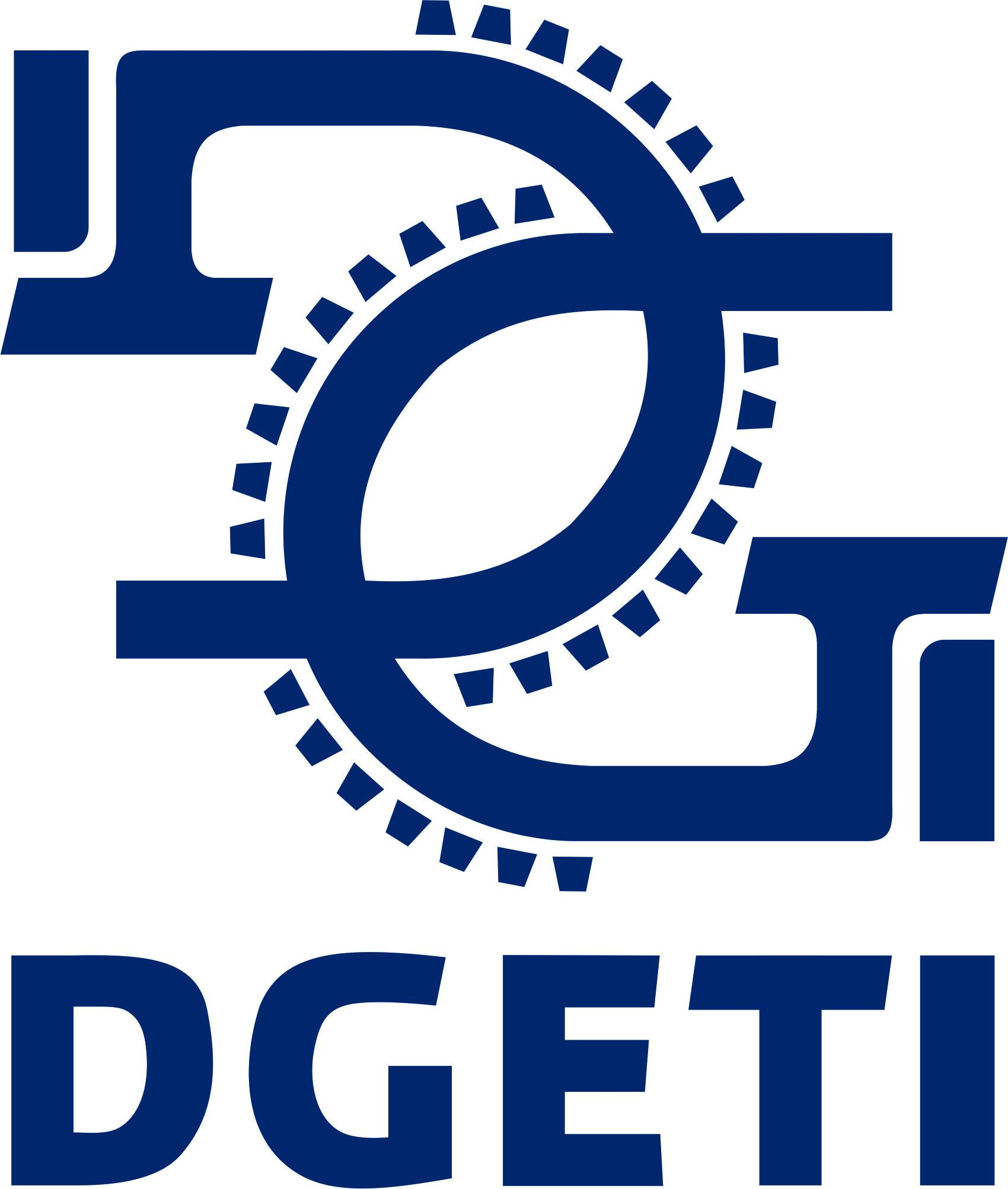 Logotipo de el sistema DGETI en Mexico.